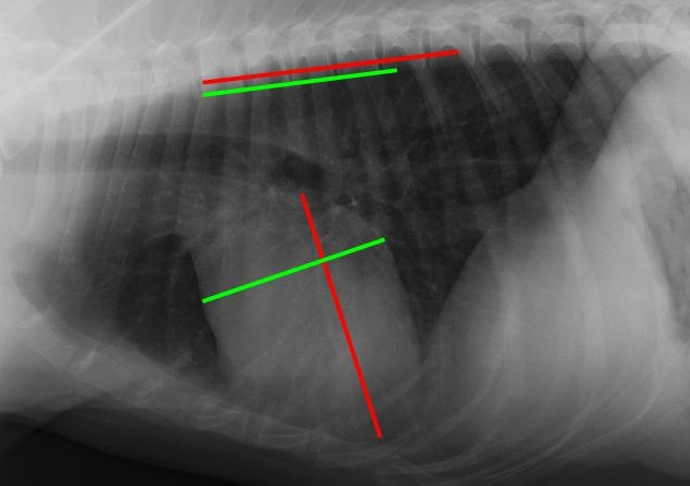 Bestiummung des vertebral heart score